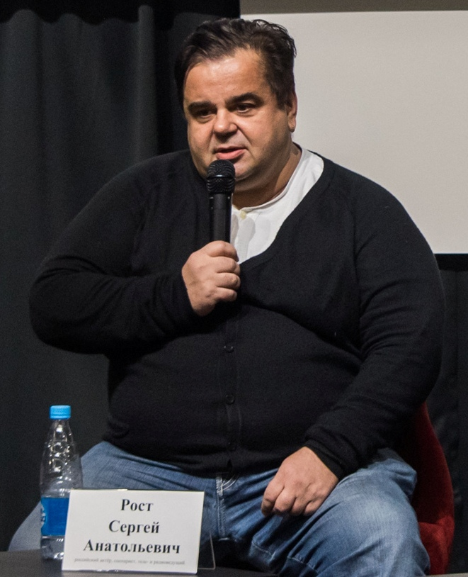 Сергей Рост на показе фильма «Ничей» (киноцентр «Ленфильм», 6 декабря 2017)